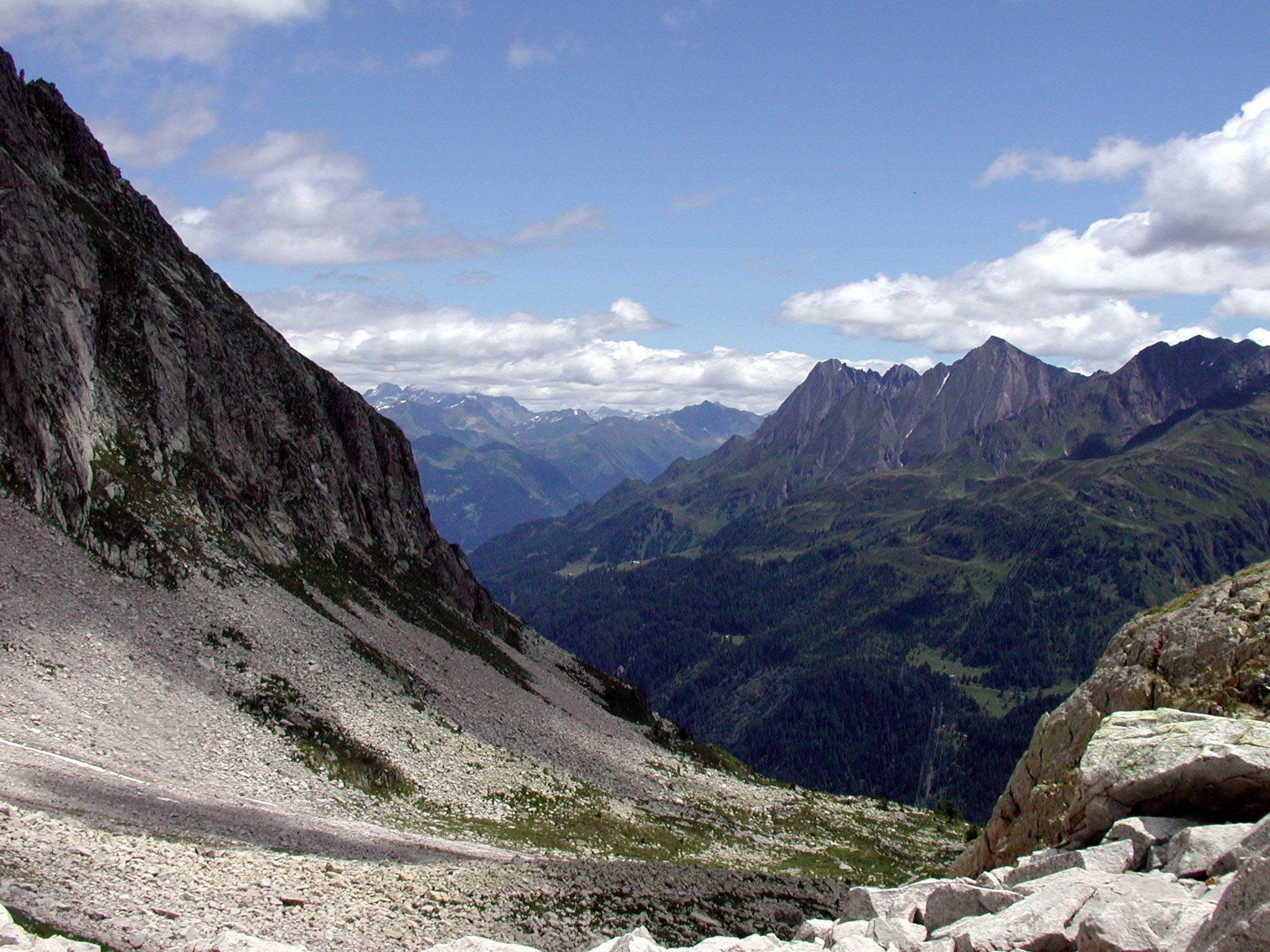 Val Bedretto